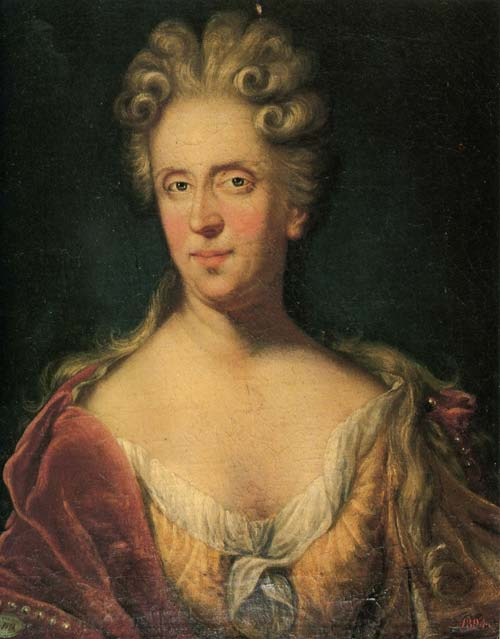 Анна Даниловна Девиер, урож. Меншикова (1689 - 1750-е)